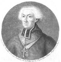 Jean-Évangéliste Zäpfel (Zaepfell)